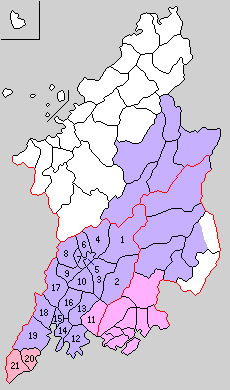 山口県吉敷郡の町村制時点の町村。